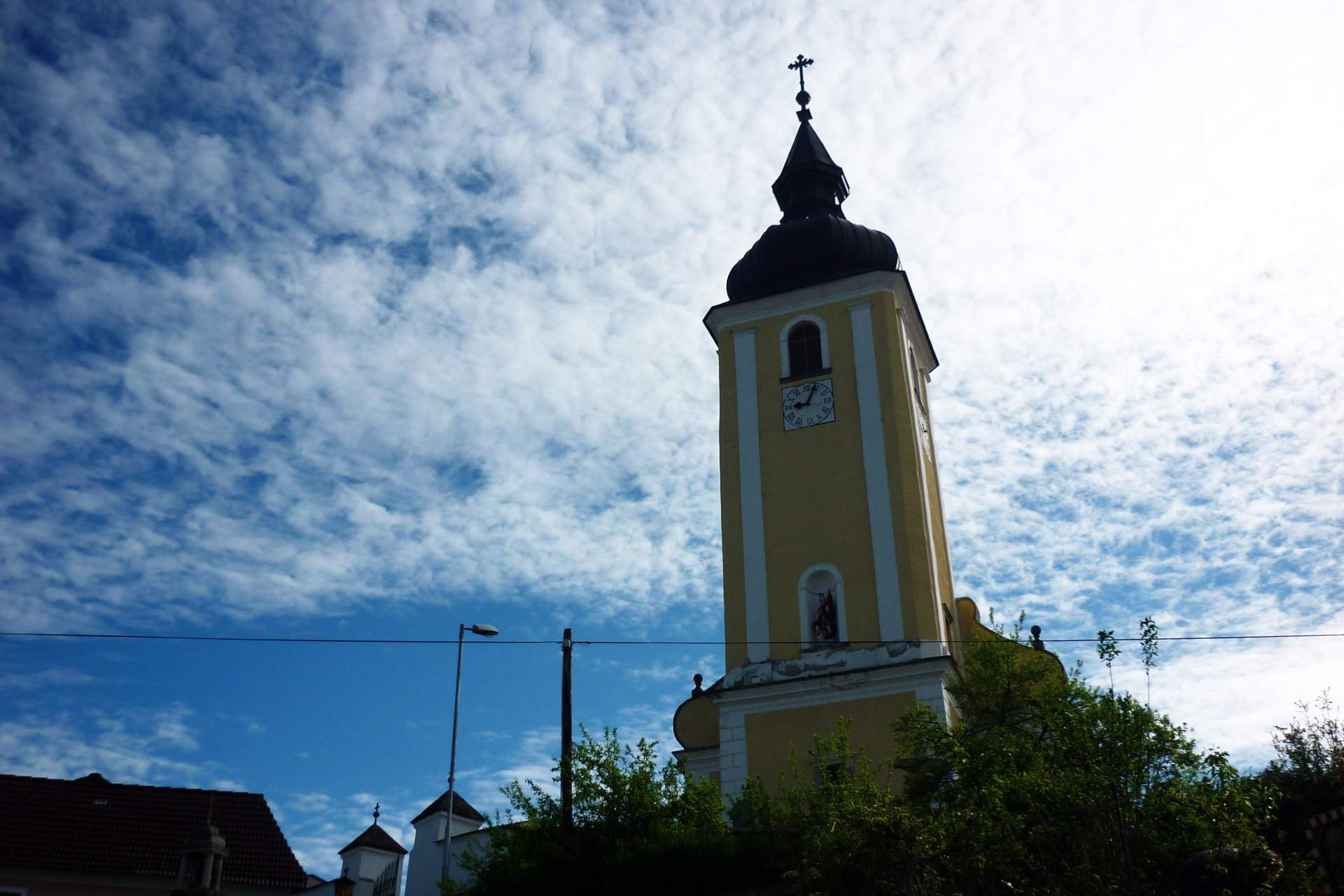 Kath. Pfarrkirche hl. Martin, Waldkirchen a. d. Thaya